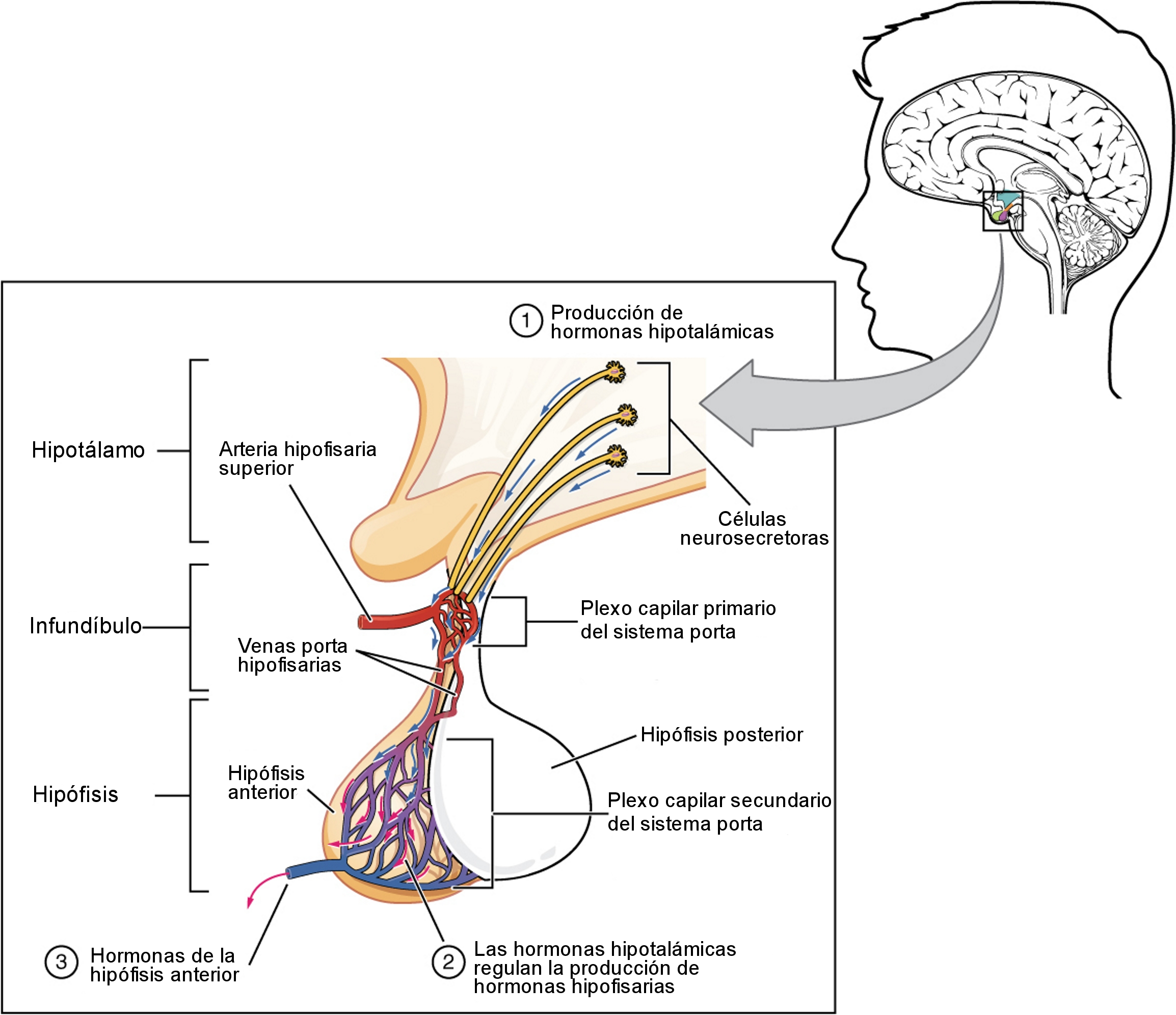 Esquema en el que se representa la regulación de la secreción hormonal de la hipófisis anterior gracias mediada por las hormonas hipotalámicas.